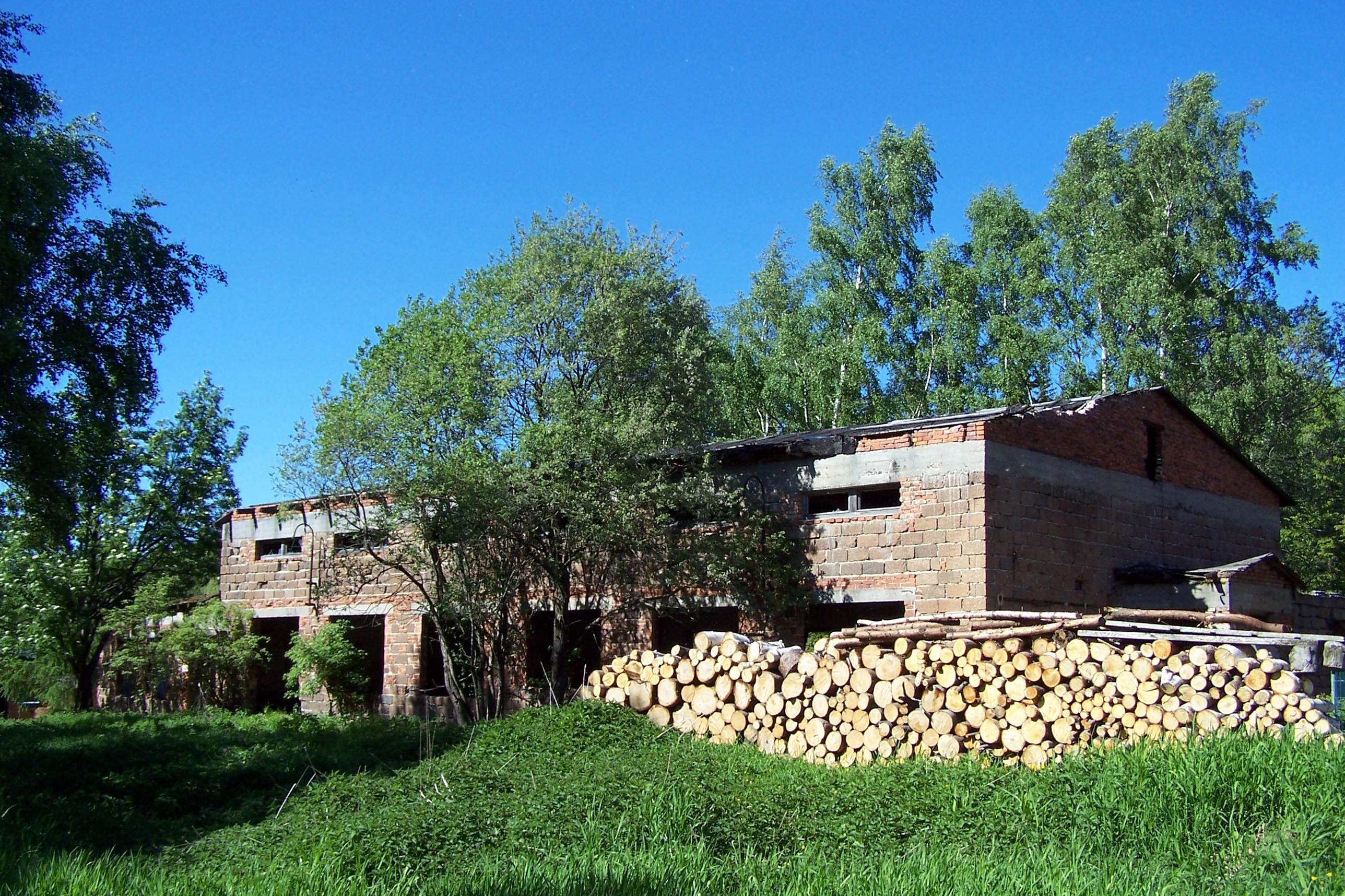 Bývalý pracovní tábor Rovnost – původní budova převlékárny.